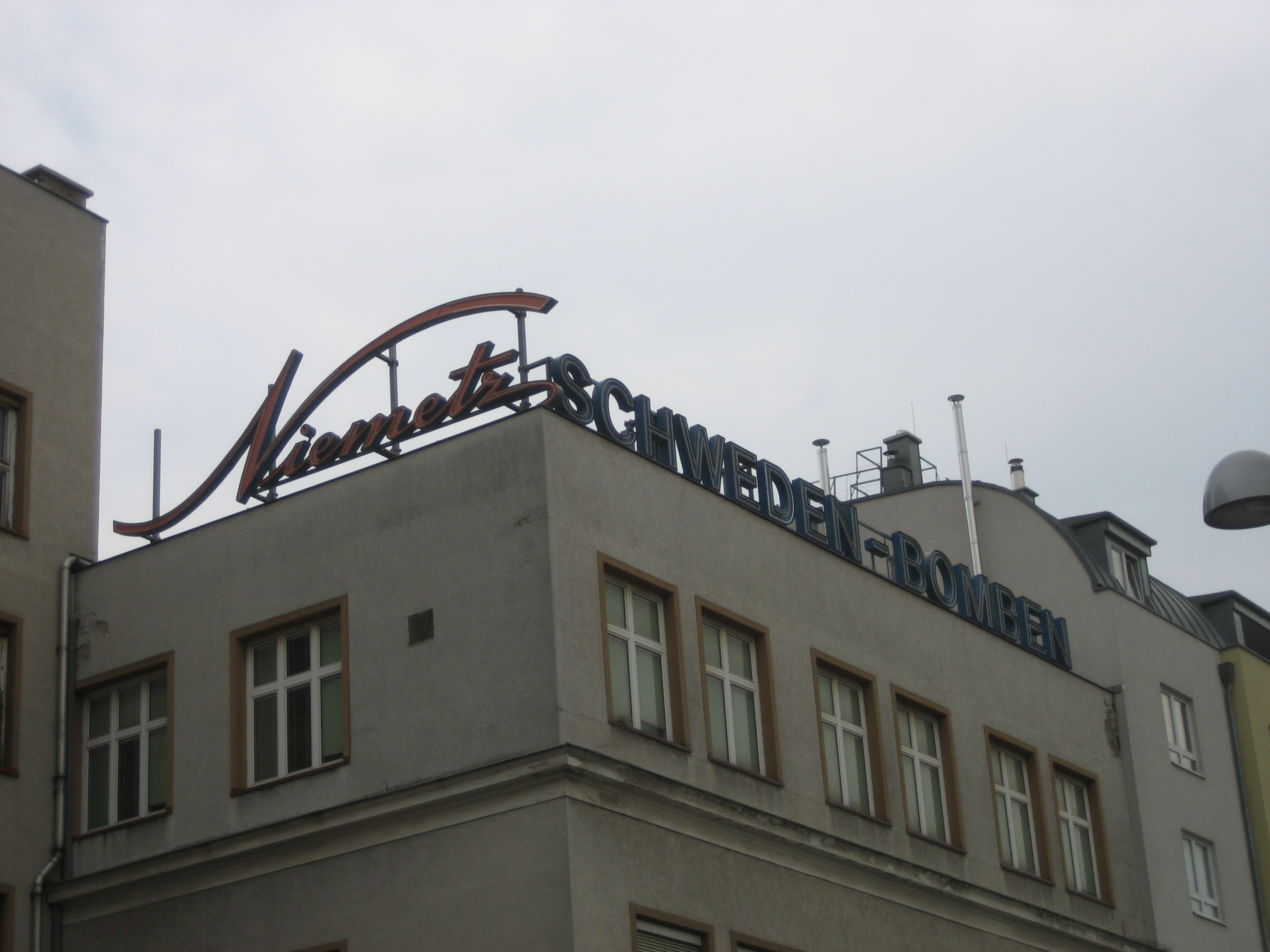 das Haus Aspangstraße 27 in Wien Landstraße; Fabrikgebäude der Fa. Niemetz